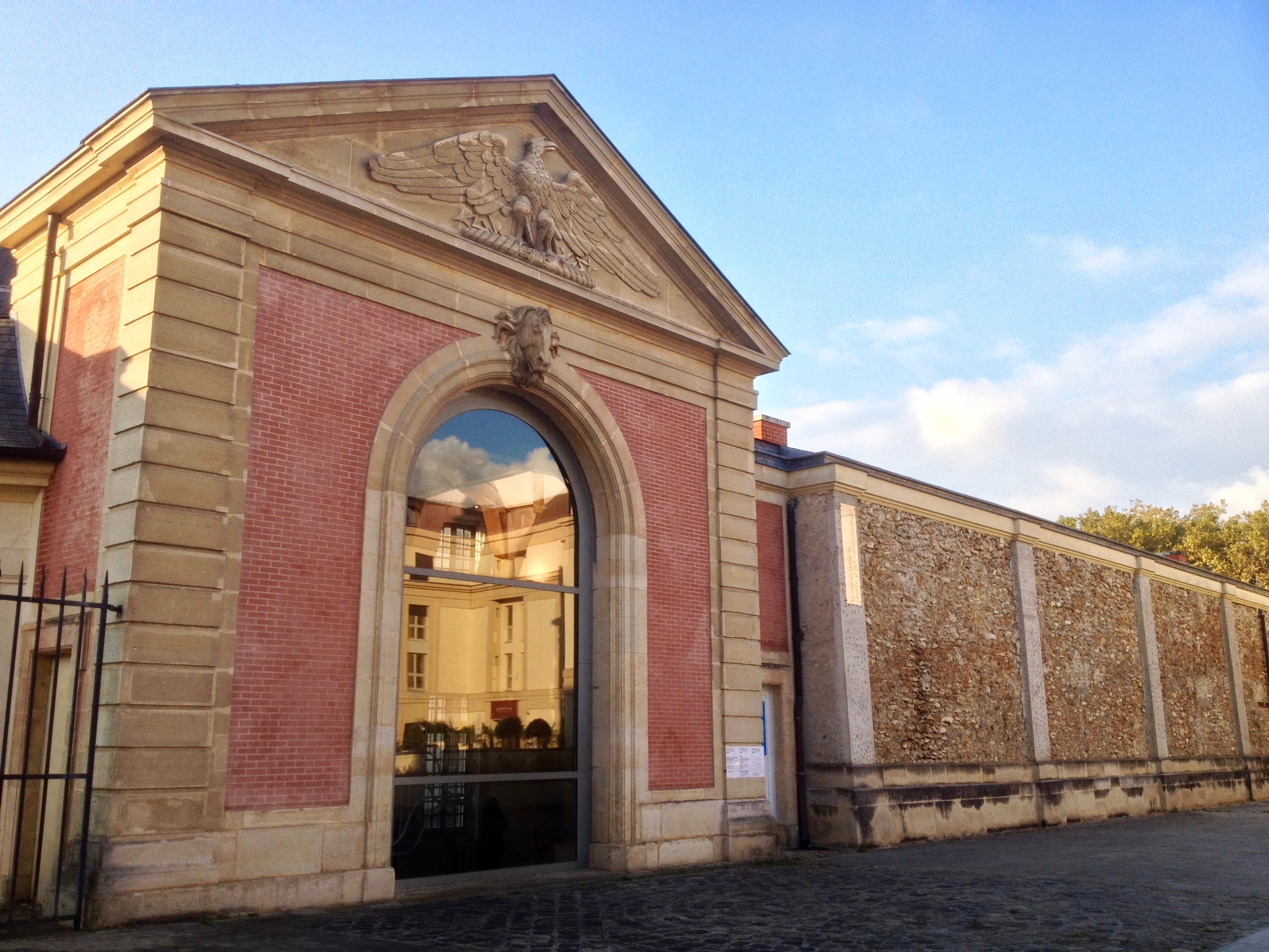 la Maréchale, le centre d'art contemporain